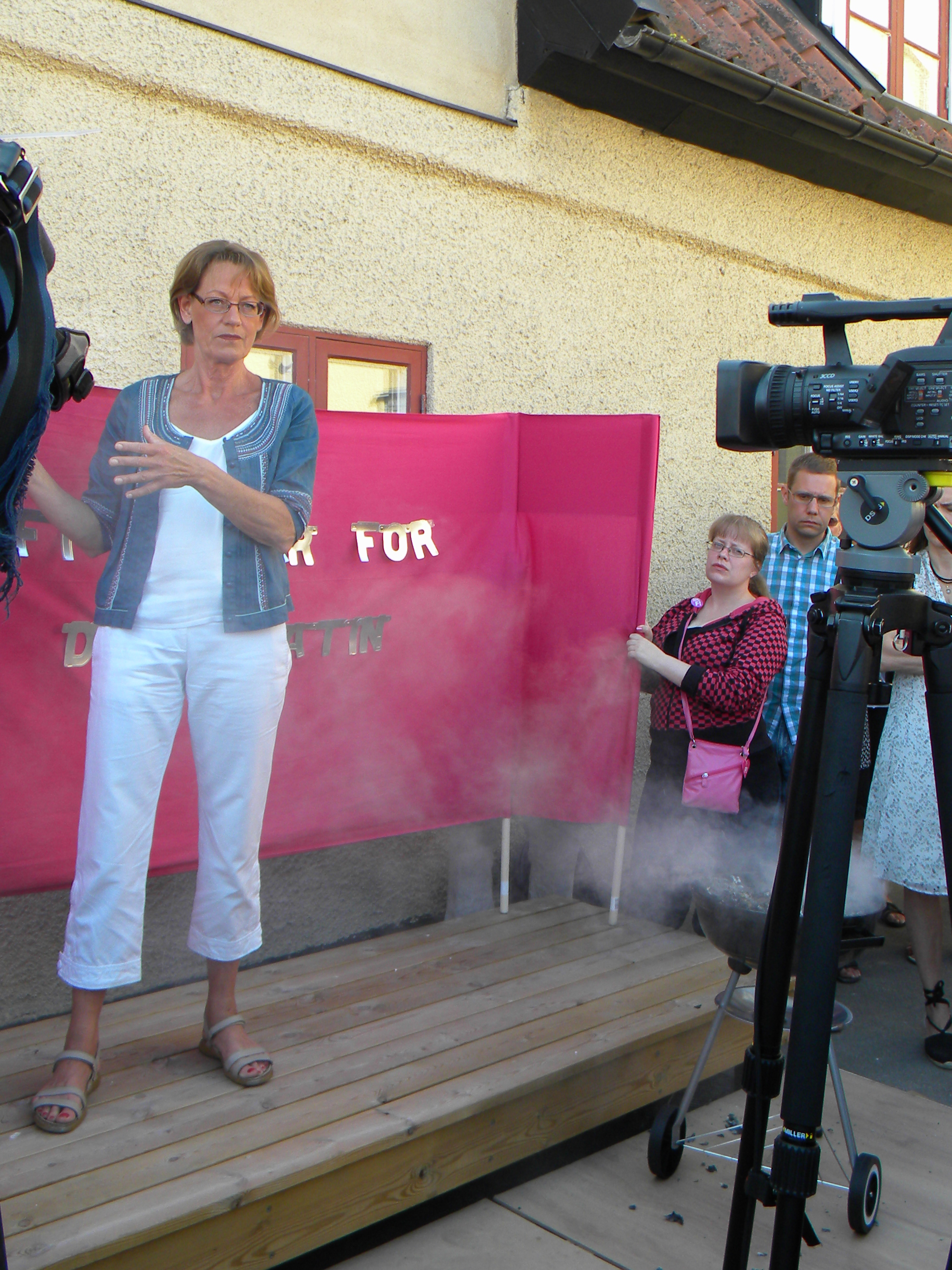 Gudrun Schyman (Feministiskt iniativ) eldade upp 100 000 kr i Almedalen 2010